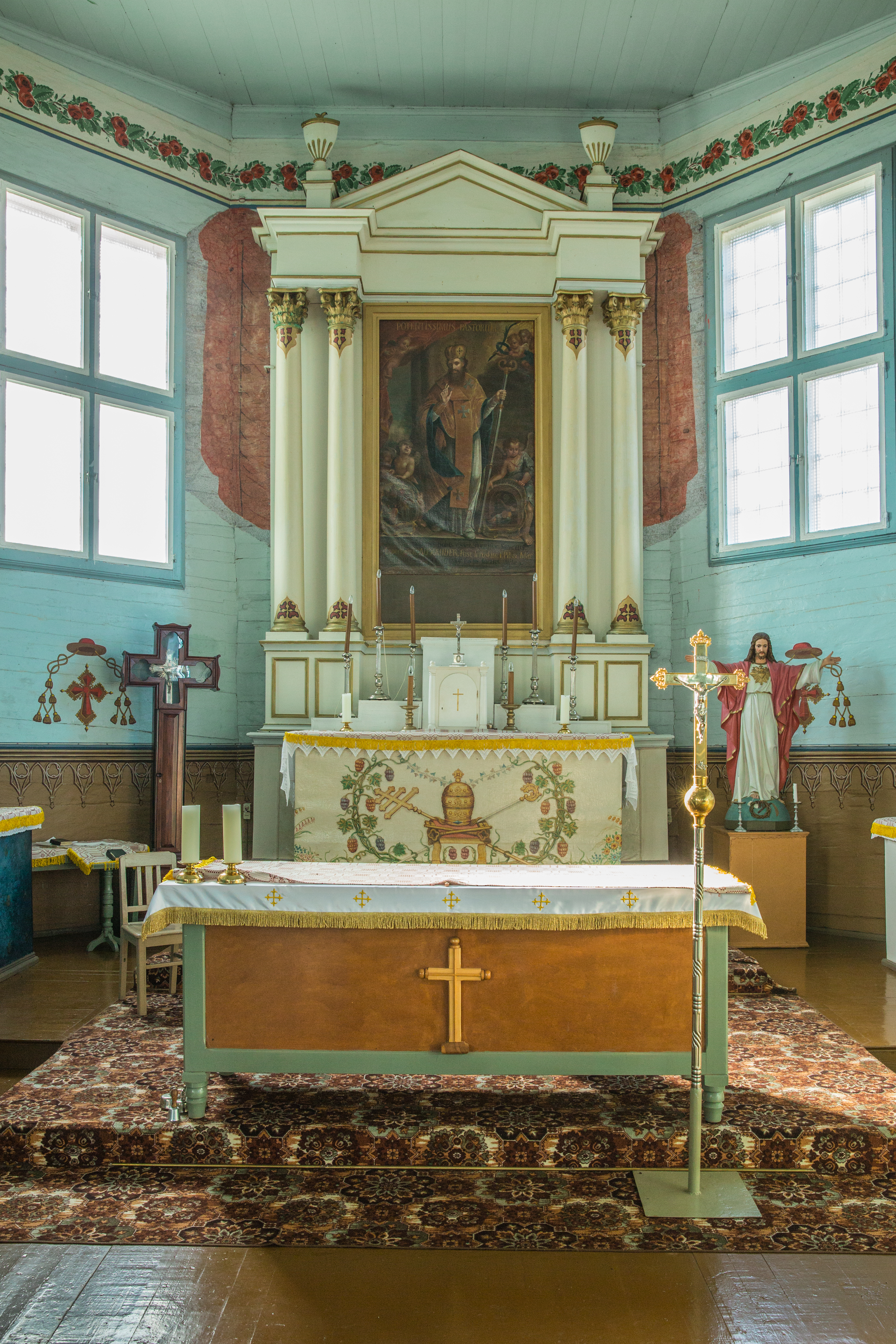 Šv. Aleksandro bažnyčios altorius